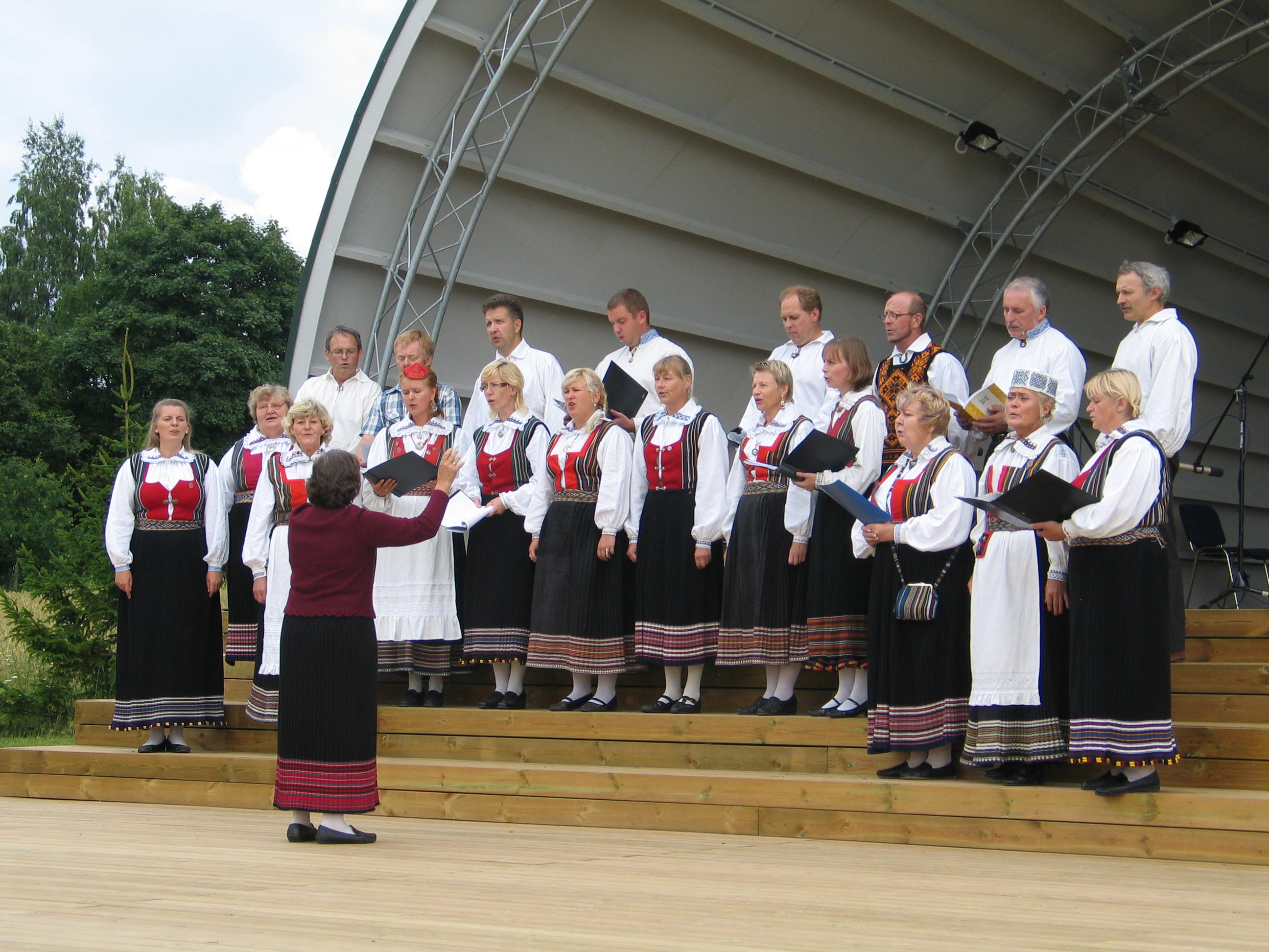 Segakoor Waldia laulmas Õie Pärteli juhendamisel Jööri folgil